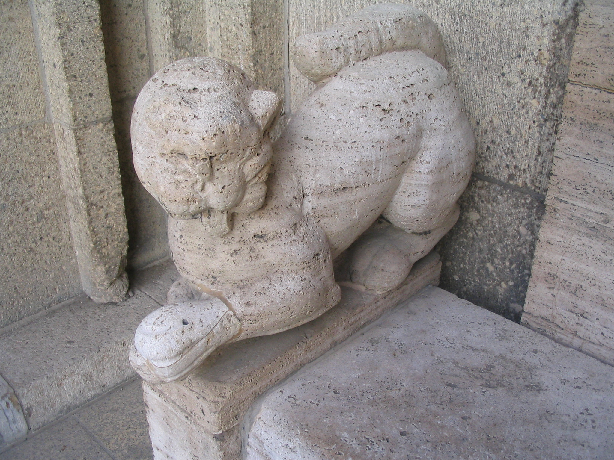 Carl-Moritz Schreiner, 2 Bänke (die linke Bank) neben dem Osteingang des Museum Kunstpalast, Düsseldorf Ehrenhof, Robert-Schumann-Saal.